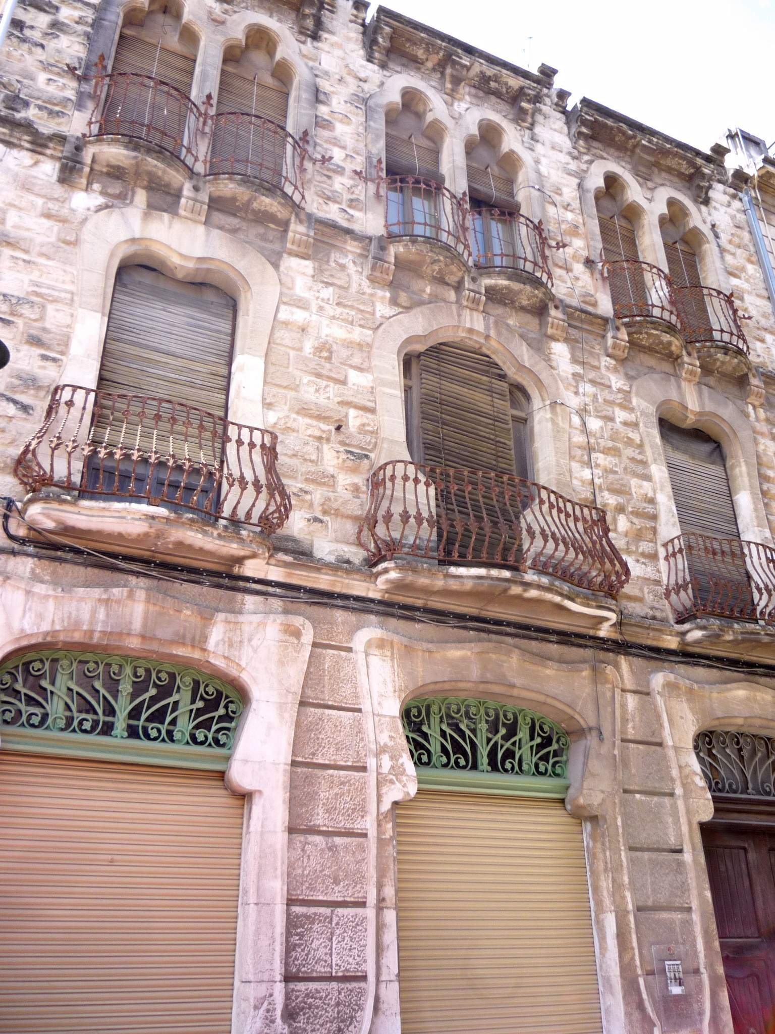 Alcoy - Edificio modernista en la calle Joan Cantó, 8